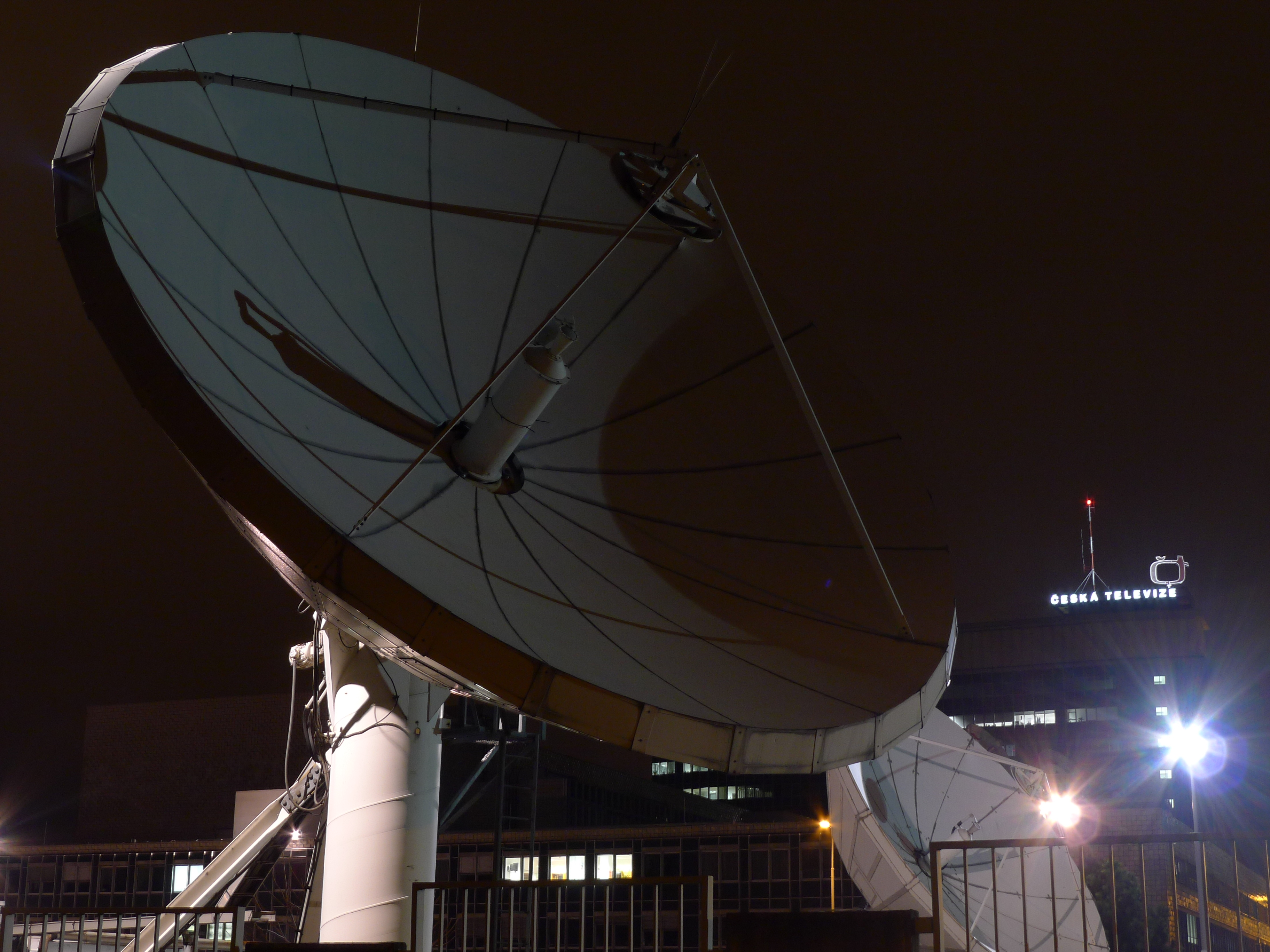 Přenosová parabola u České televize v Praze na Kavčích horách